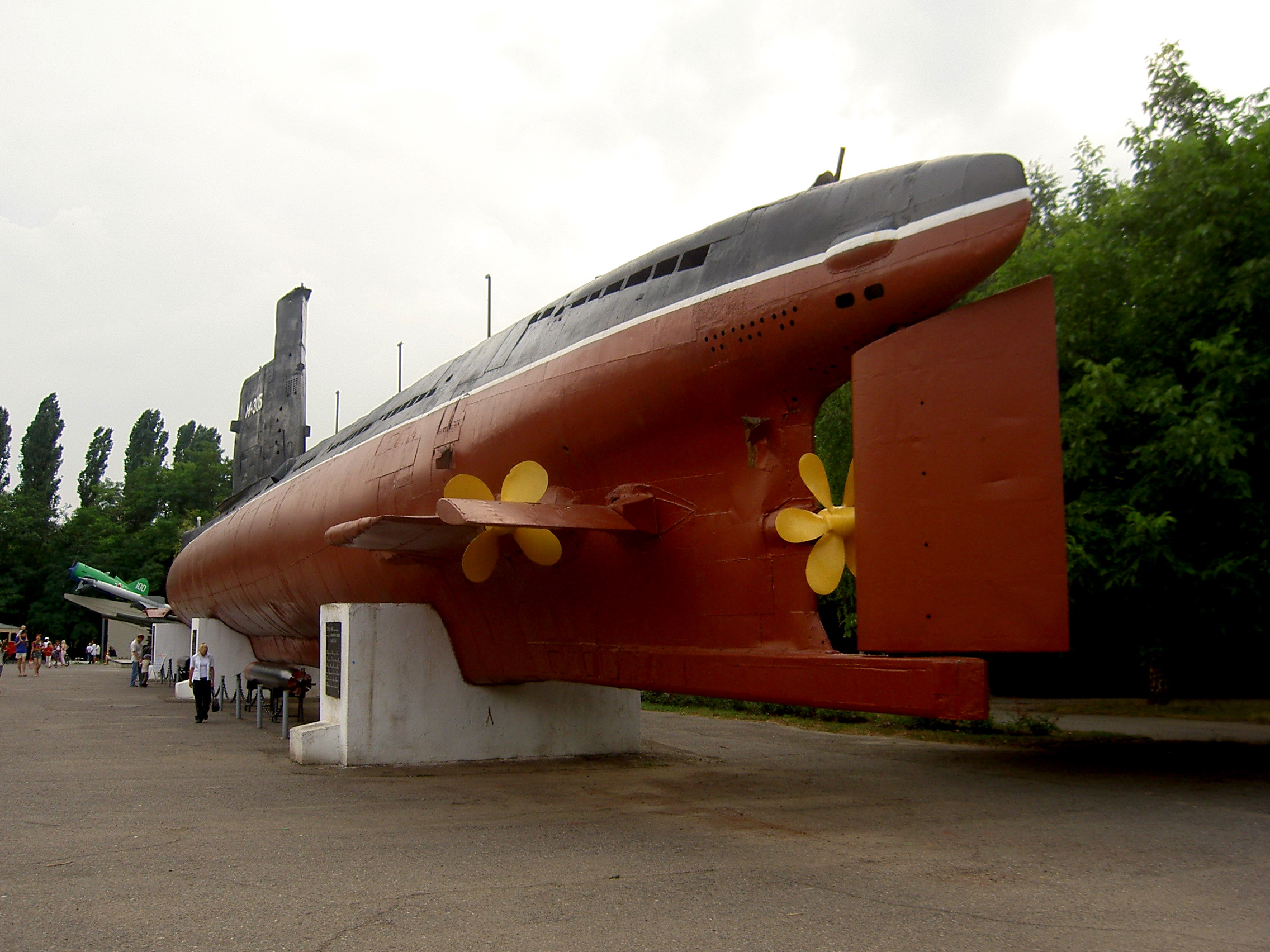 Muzeum partyzánské slávy v Oděse